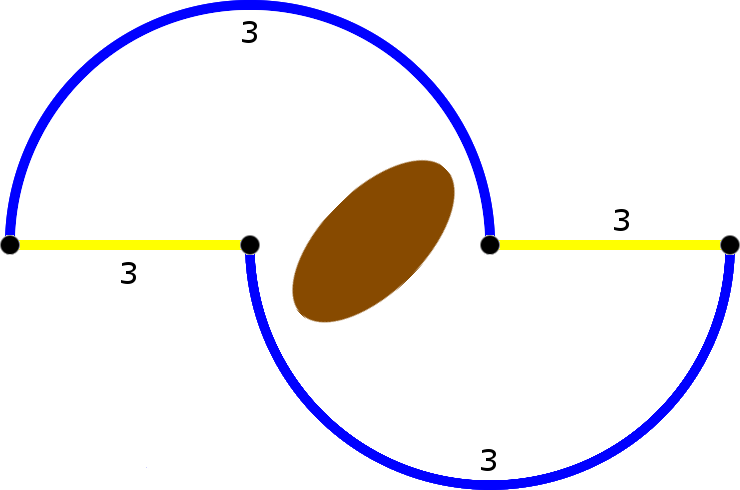 Illustration zum Braess-Paradoxon